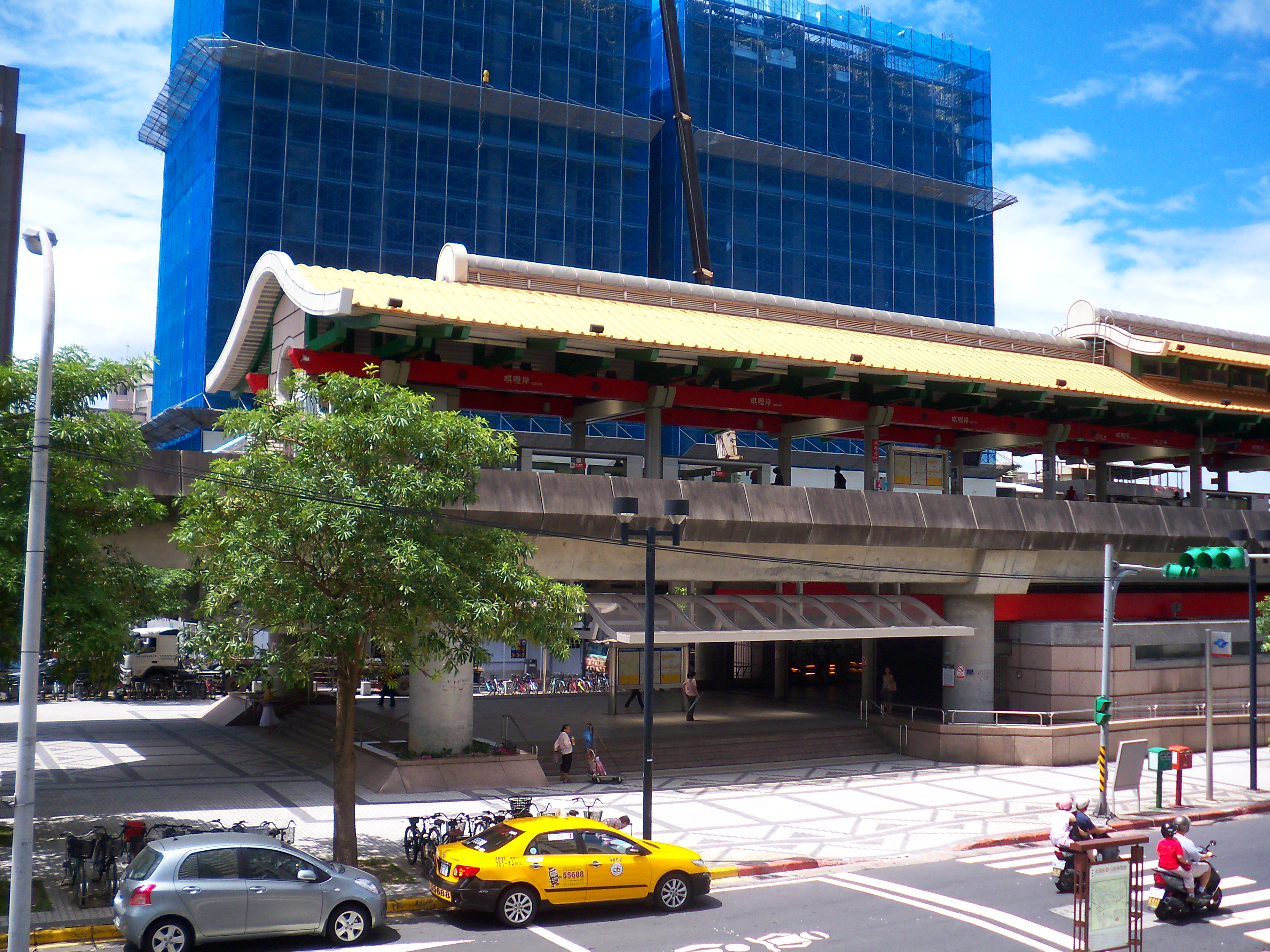 台北捷運淡水線唭哩岸駅駅舎。